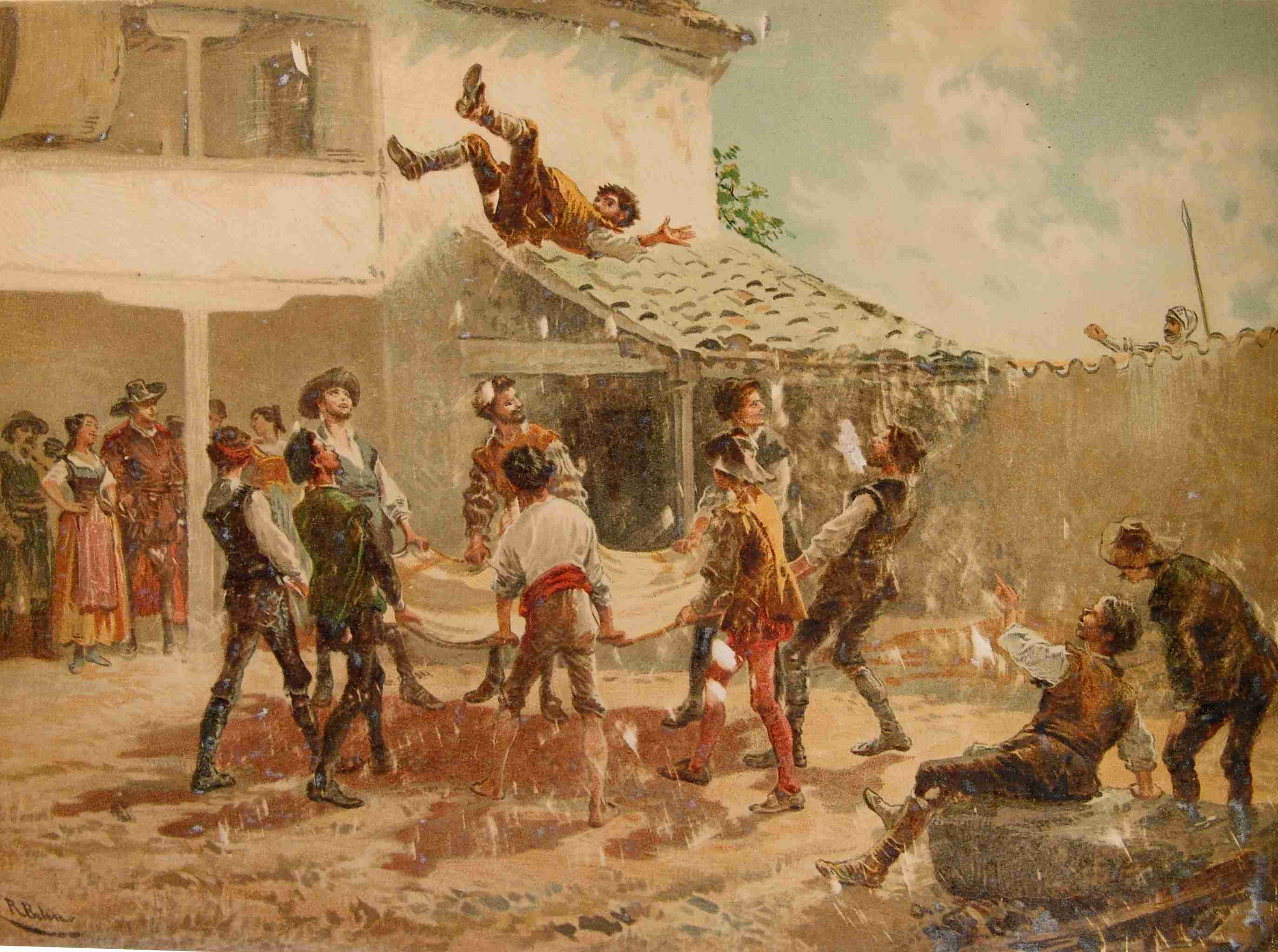 202_046_quijote_cap17